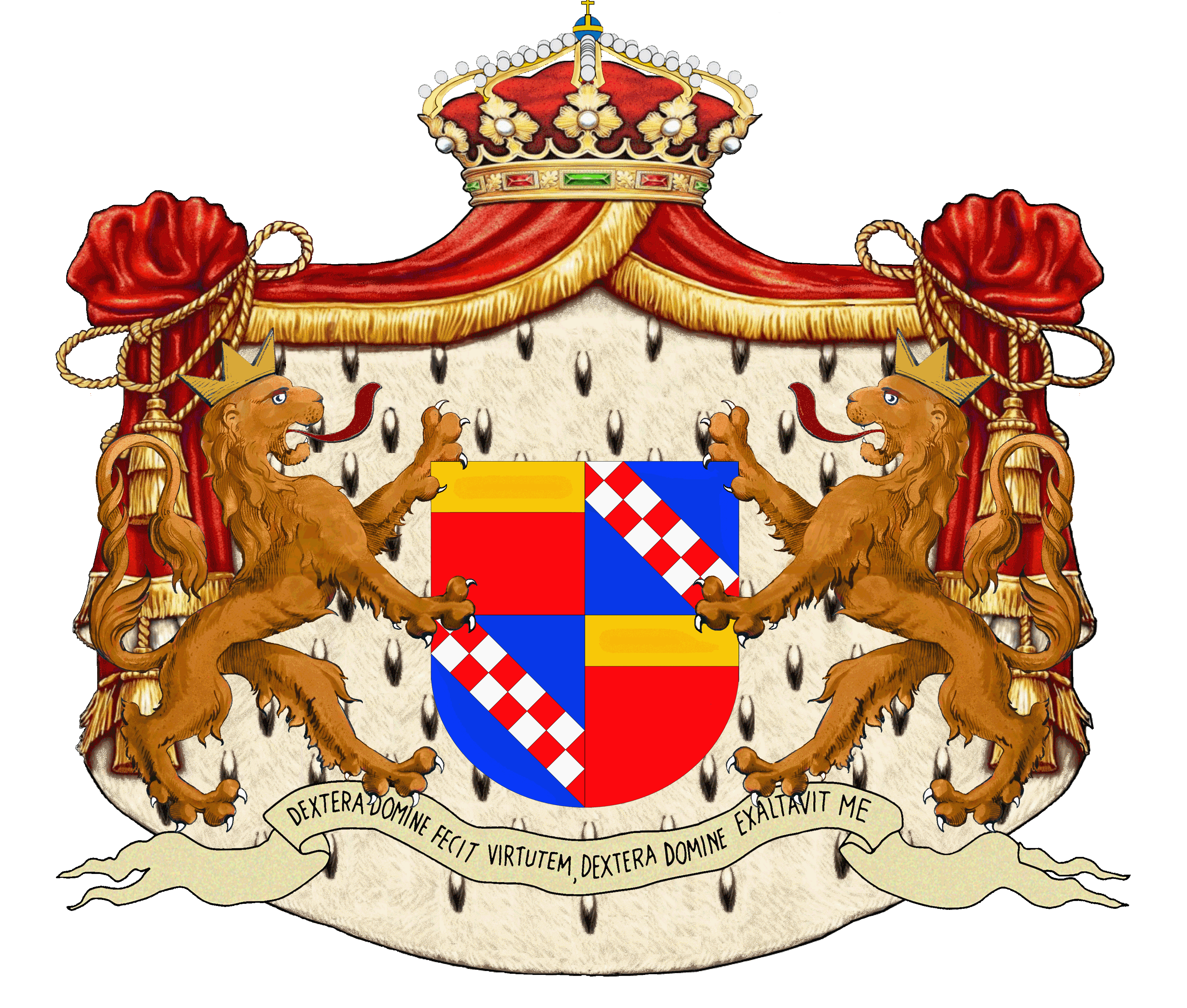 Escudo de Armas de la Casa Irache